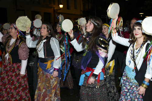 Kaldereroak Donostian.